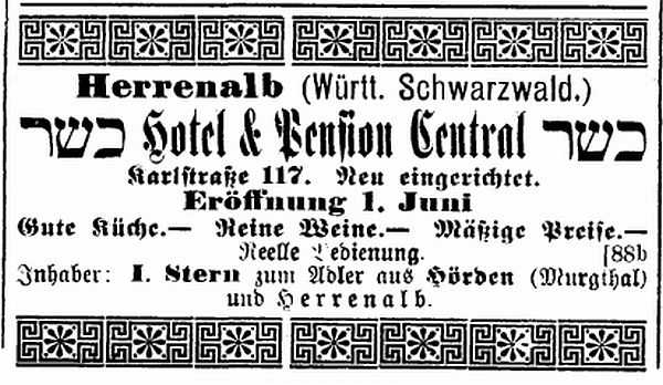 Annonce für das Hotel Central in Bad Herrenalb, Karlstraße 117, im Besitz der Familie Stern aus Hörden